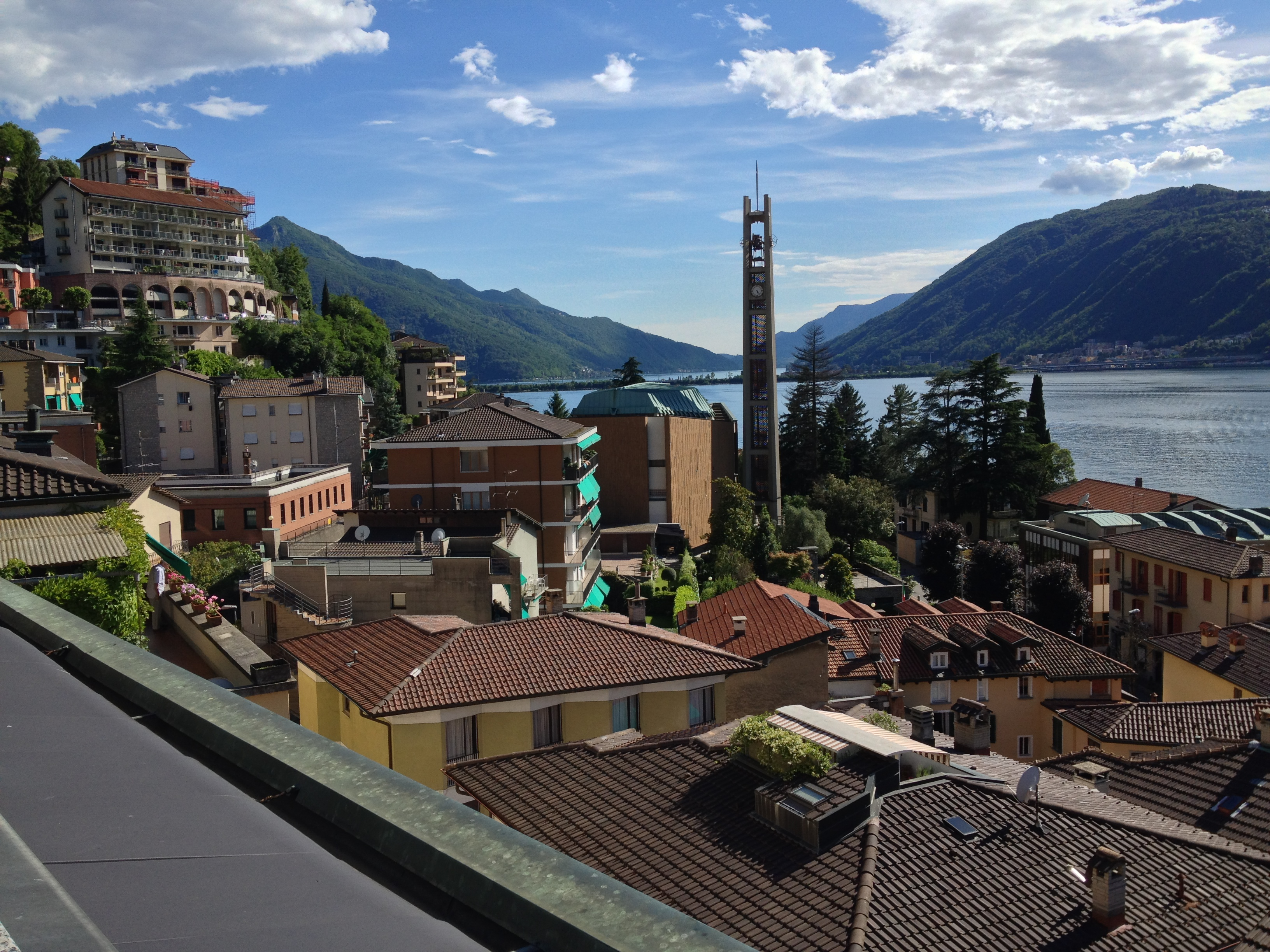 Вид на озеро Лугано и Campione